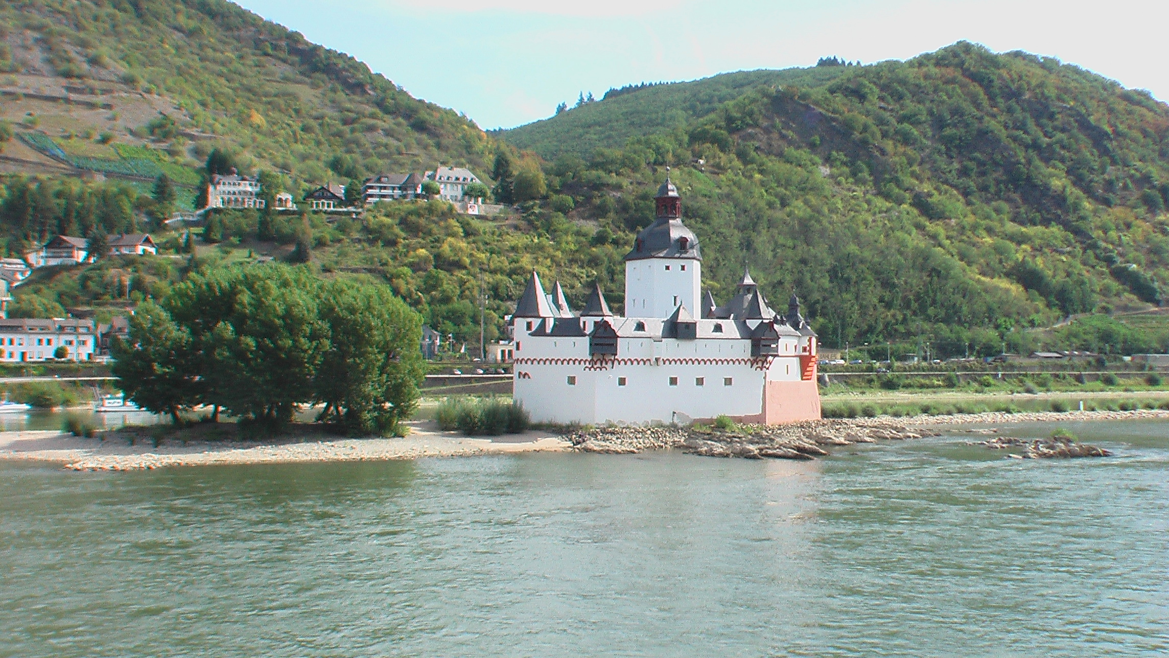 KaubBurgPfalzgrafenstein08-2012